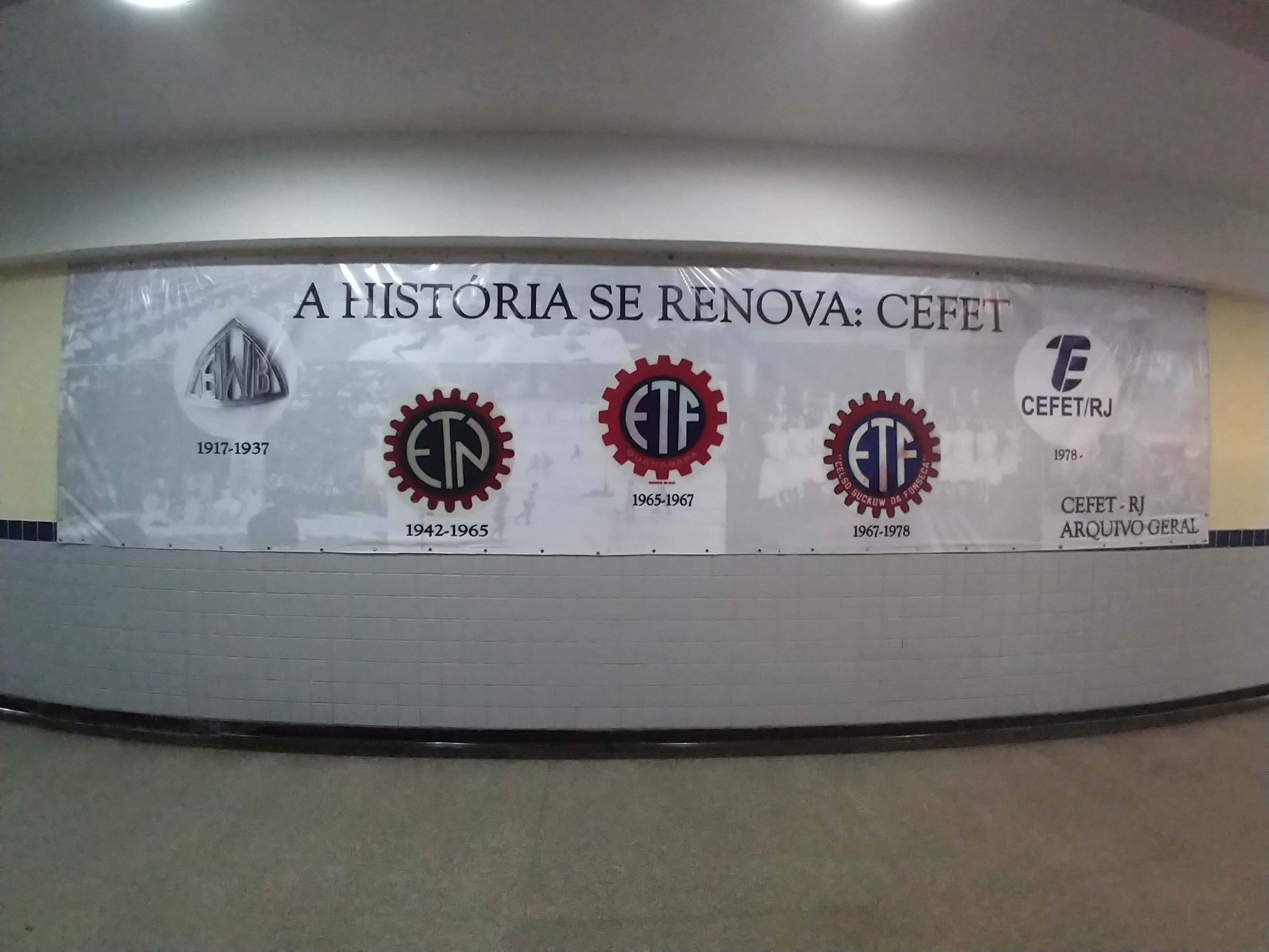 Aos 100 anos de CEFET/RJ, o Arquivo Geral da instituição Pública Federal de ensino relembra seus Logos ao longo da história.